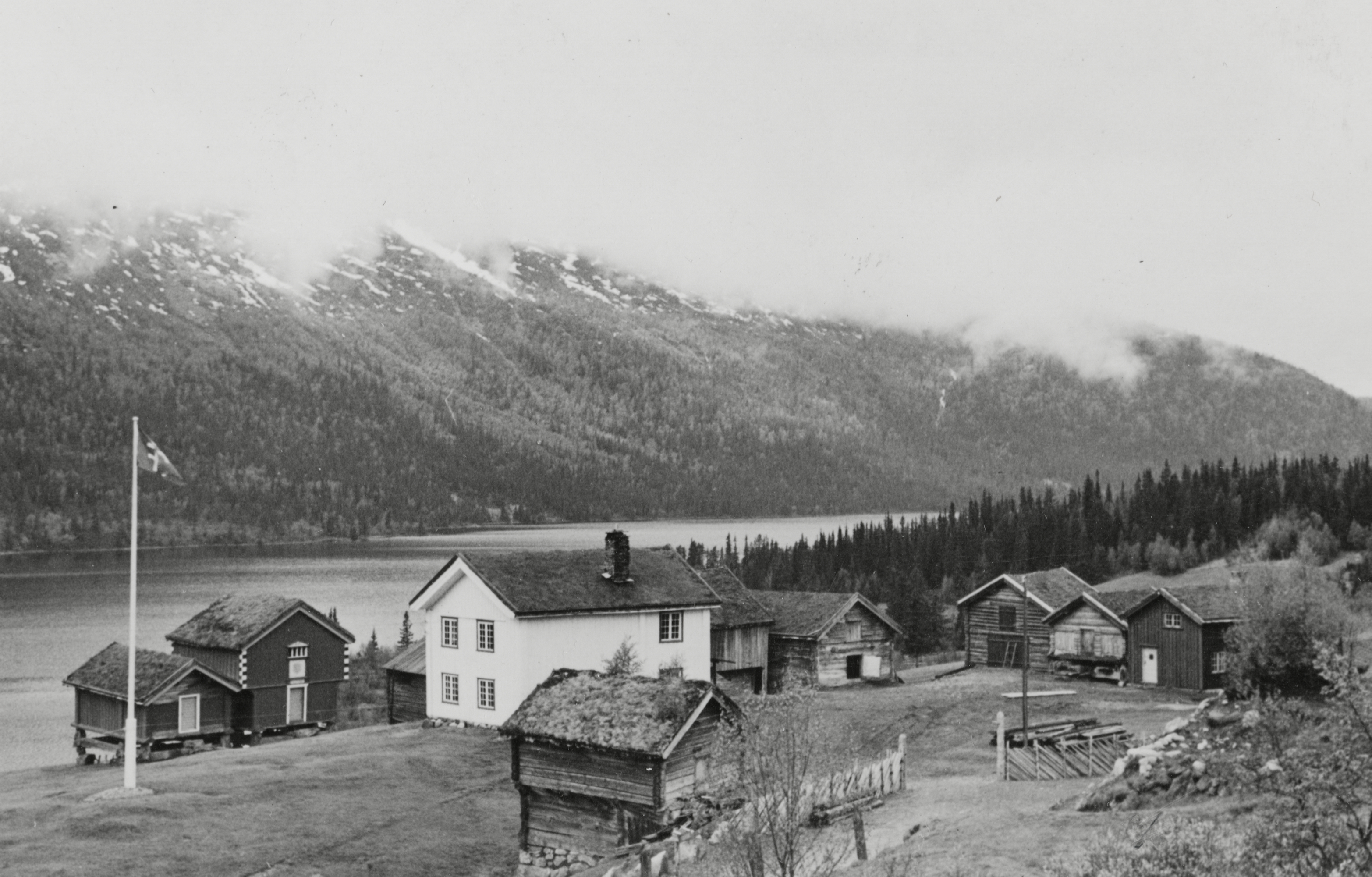 Lognvik Søre, Lognvik Søndre, Lønvik Søndre i Rauland, Telemark Oversikt This image on crowdsourcing geotagging platform Fotodugnad